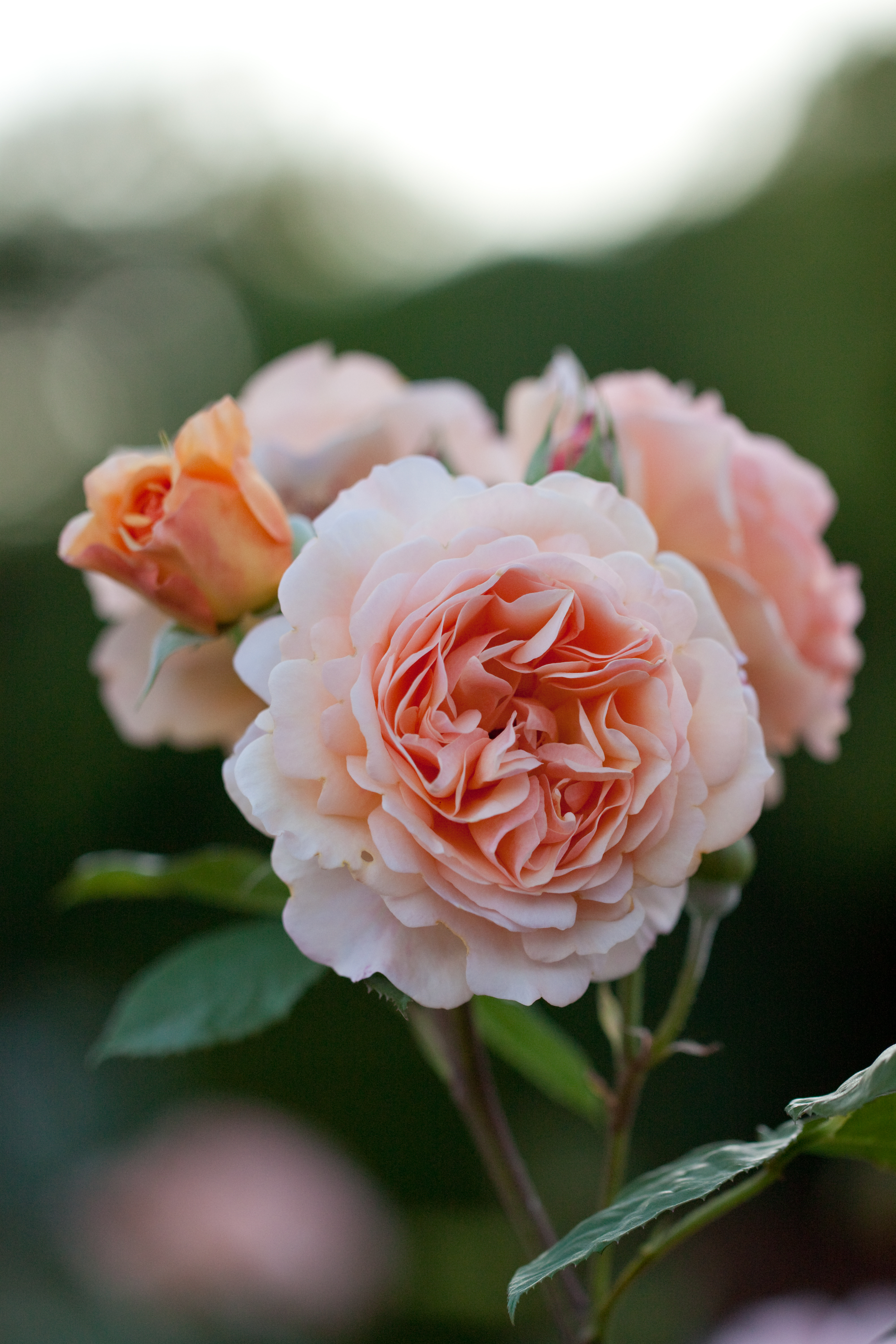 Charles Austin. チャールズ・オースチン。